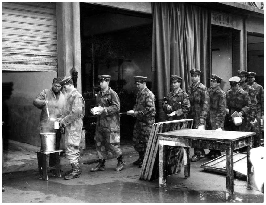 Allievi Sottufficiali Carabinieri del 59° Corso, anno accademico 1966/67, in tenuta da lavoro, cercano di rifocillarsi dalle fatiche dei loro vari interventi a favore della città, ritirando il loro misero rancio, che consumeranno nella gavetta, spesso in piedi e all’aperto